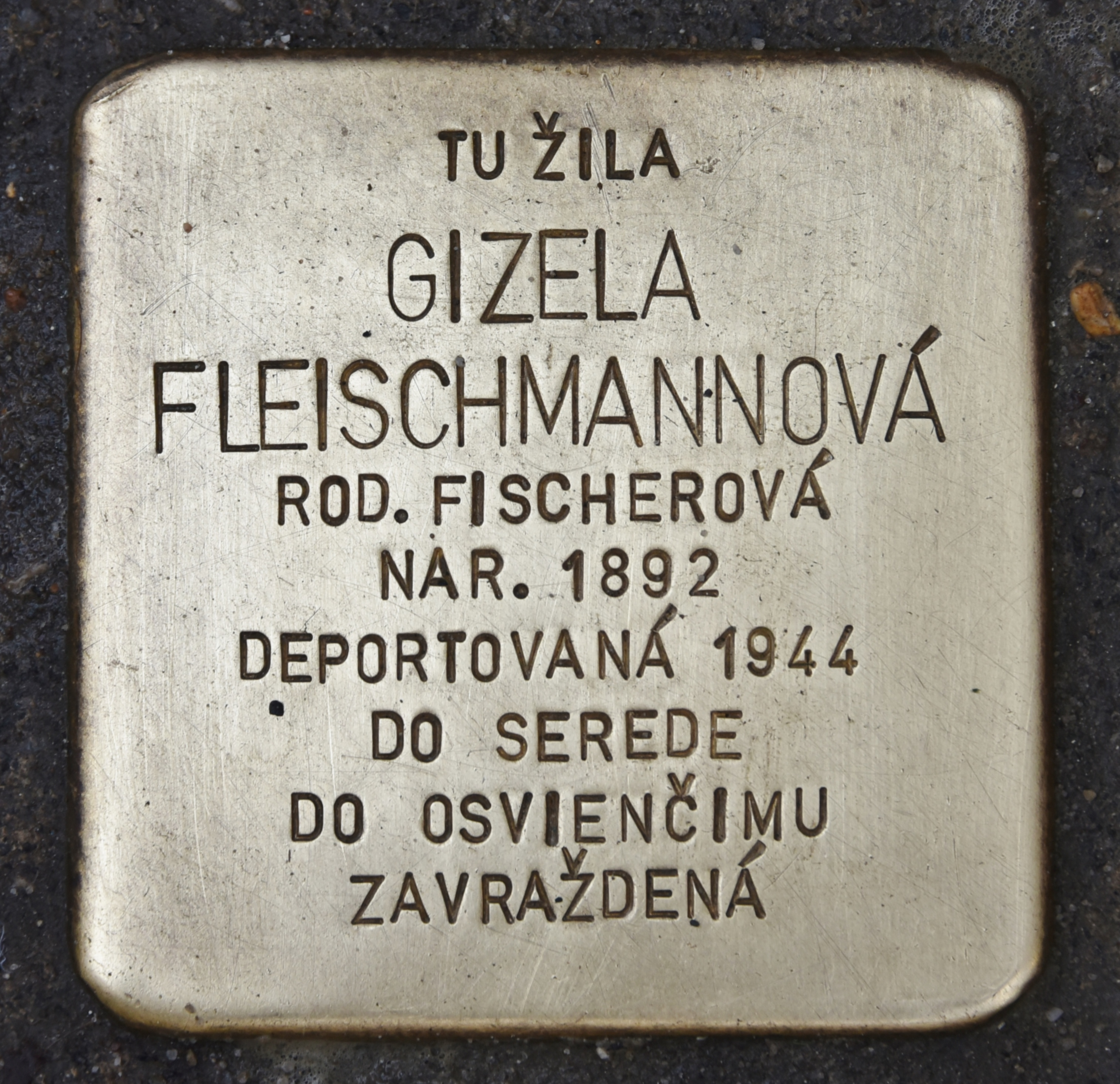 Stolperstein für Gizela Fleischmannova